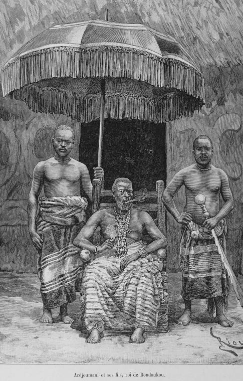 "Ardjoumani et ses fils, roi de Bondoukou"